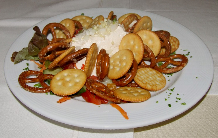 Spundekäs nach "Alzeyer Art" mit Knoblauch, und Kräckern